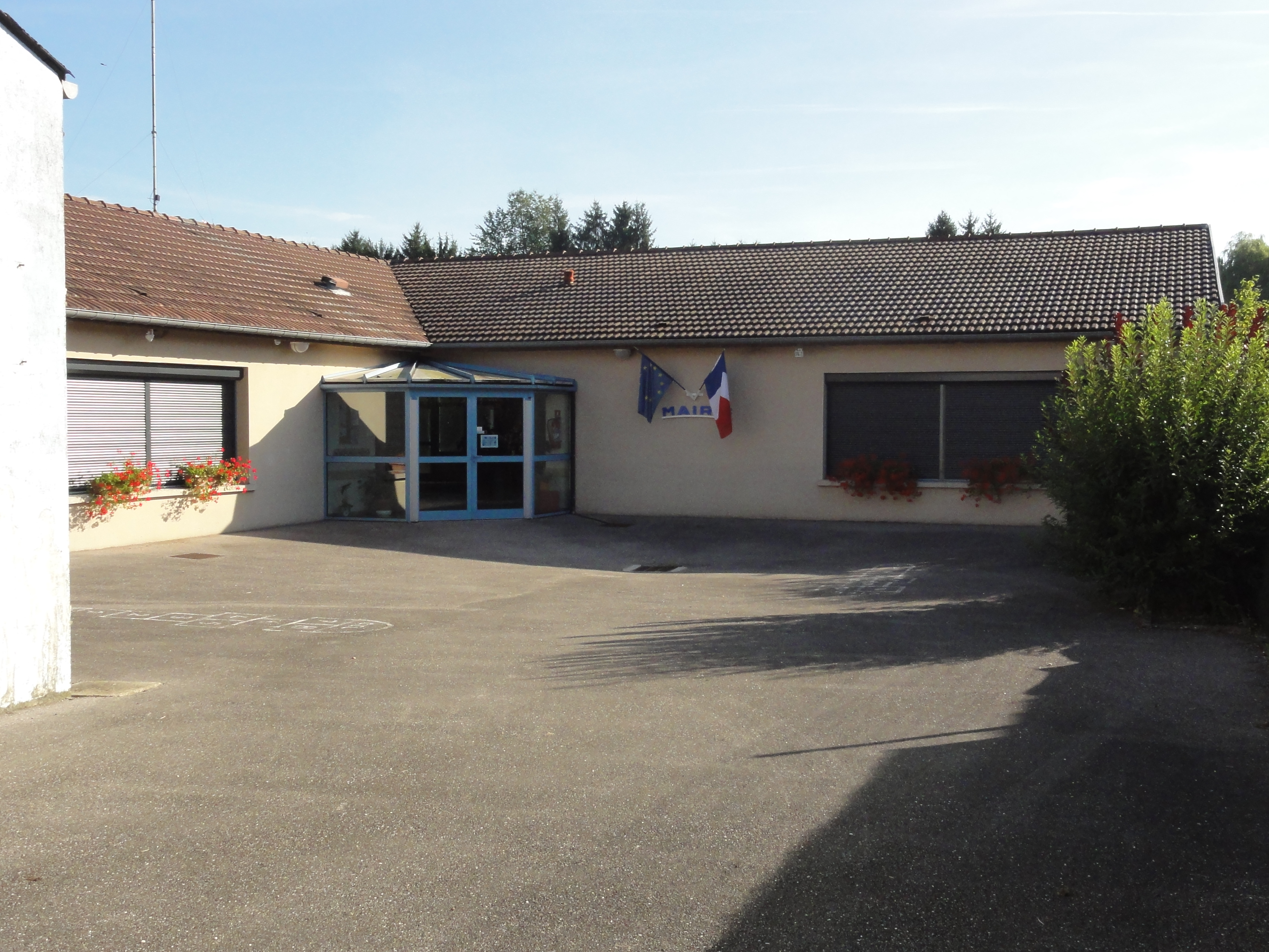 Baudonvilliers (Meuse) mairie